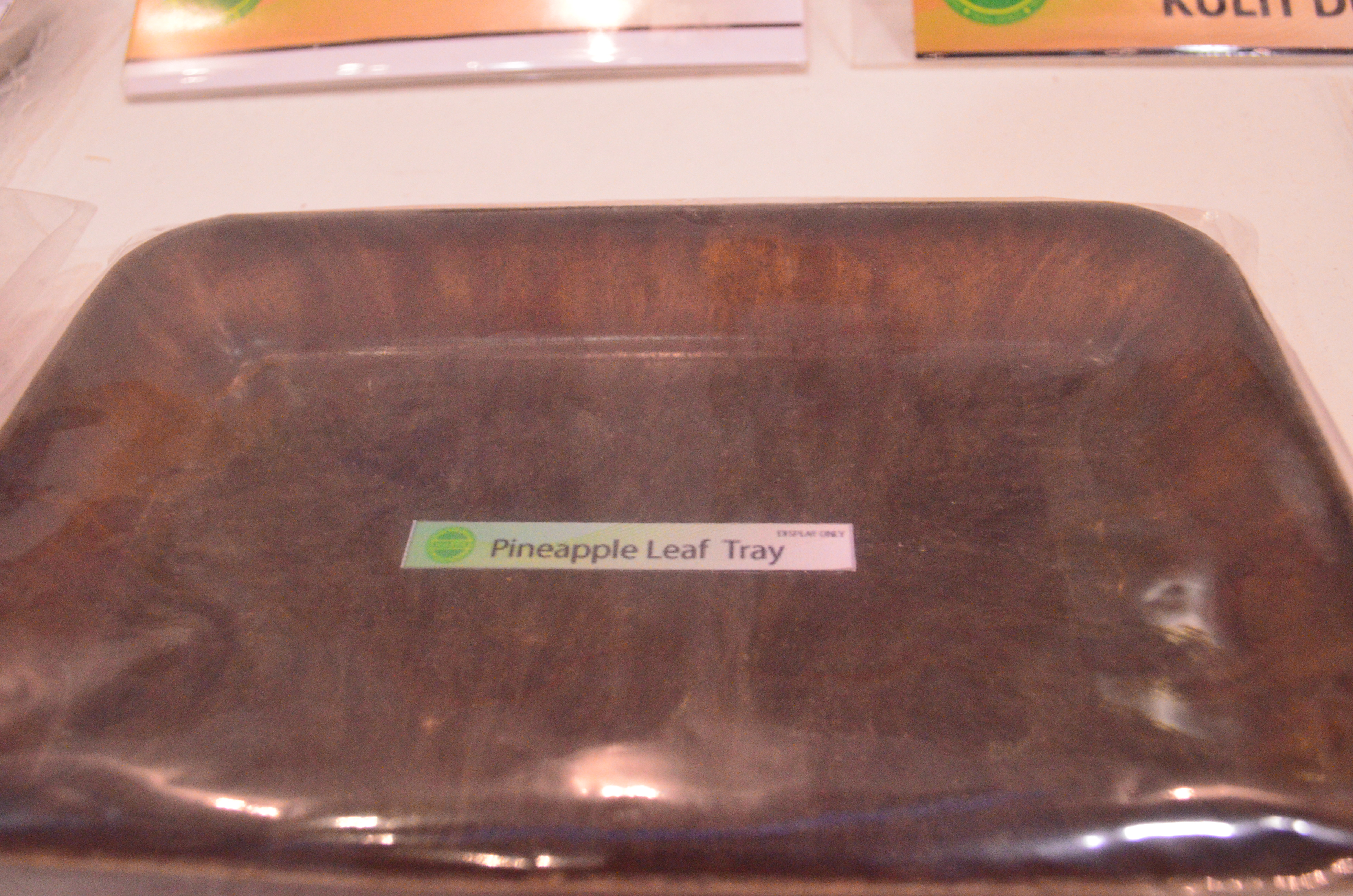 MARDI telah mencipta produk berasaskan daun nanas sebagai nilai tambah daripada pokok nanas. Antaranya adalah talam ini.